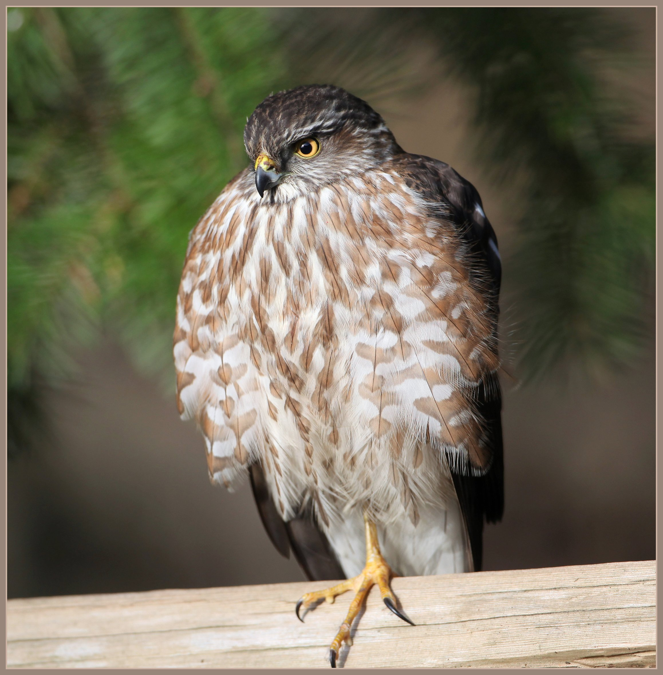 Accipiter striatus: Gavilán americano.